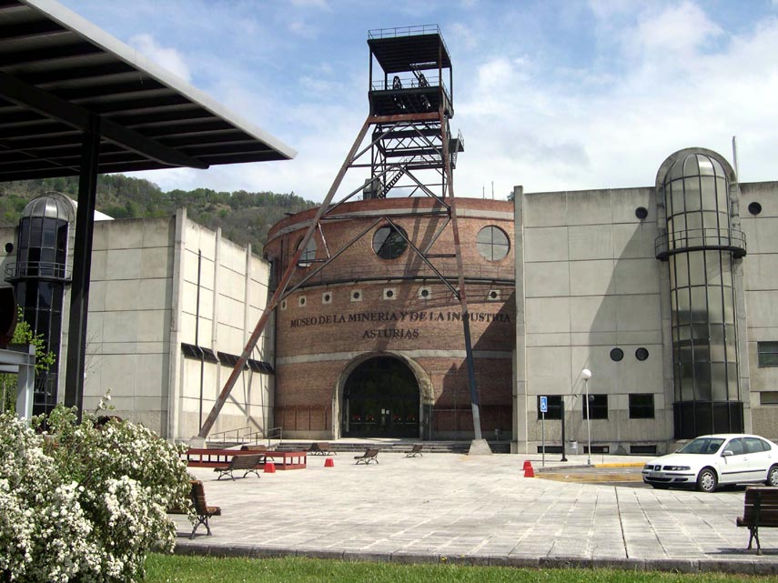 Muséu de la Minería de L'Entregu